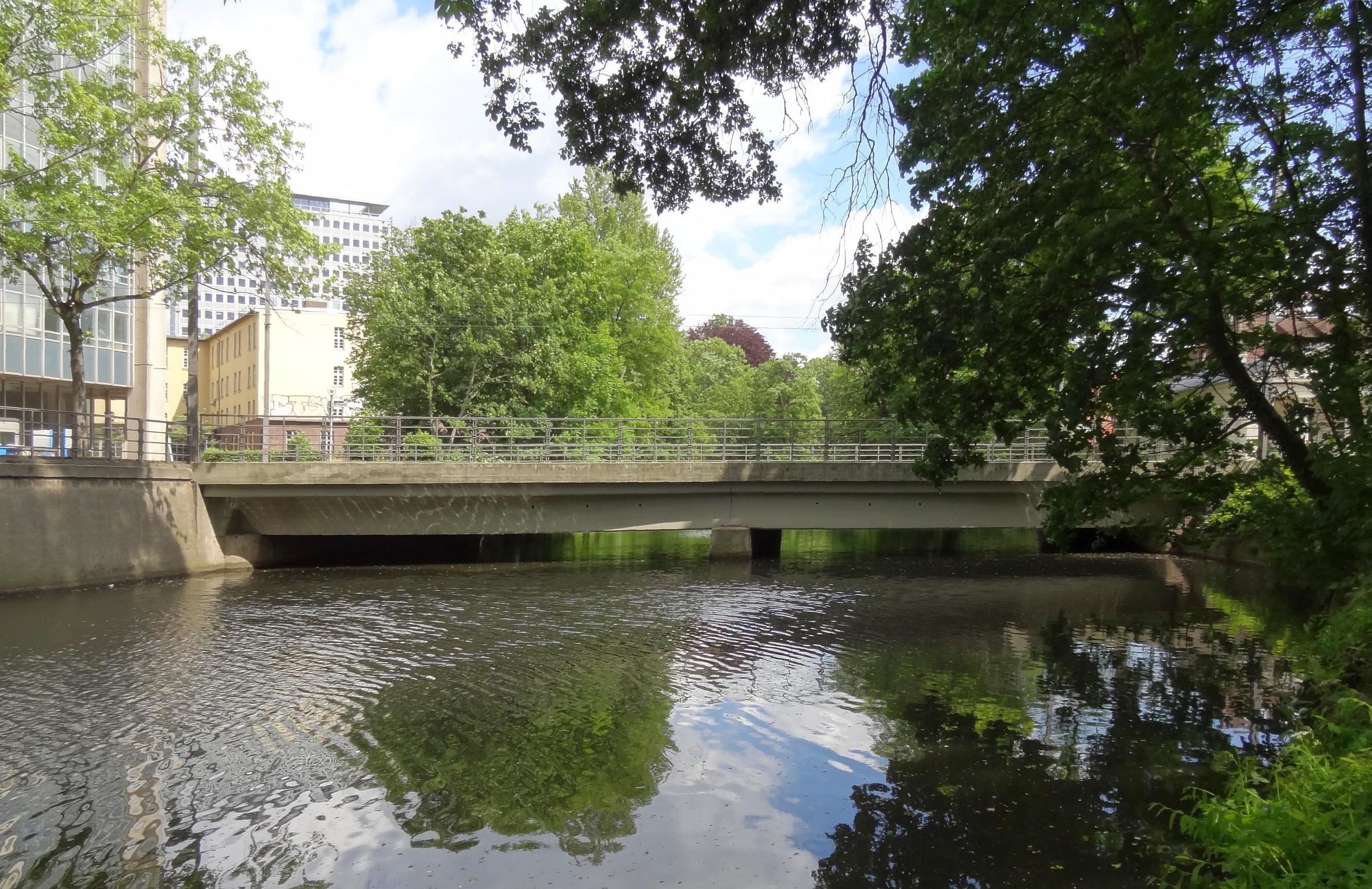 Ansicht der Wendentorbrücke in Braunschweig aus westlicher Richtung.